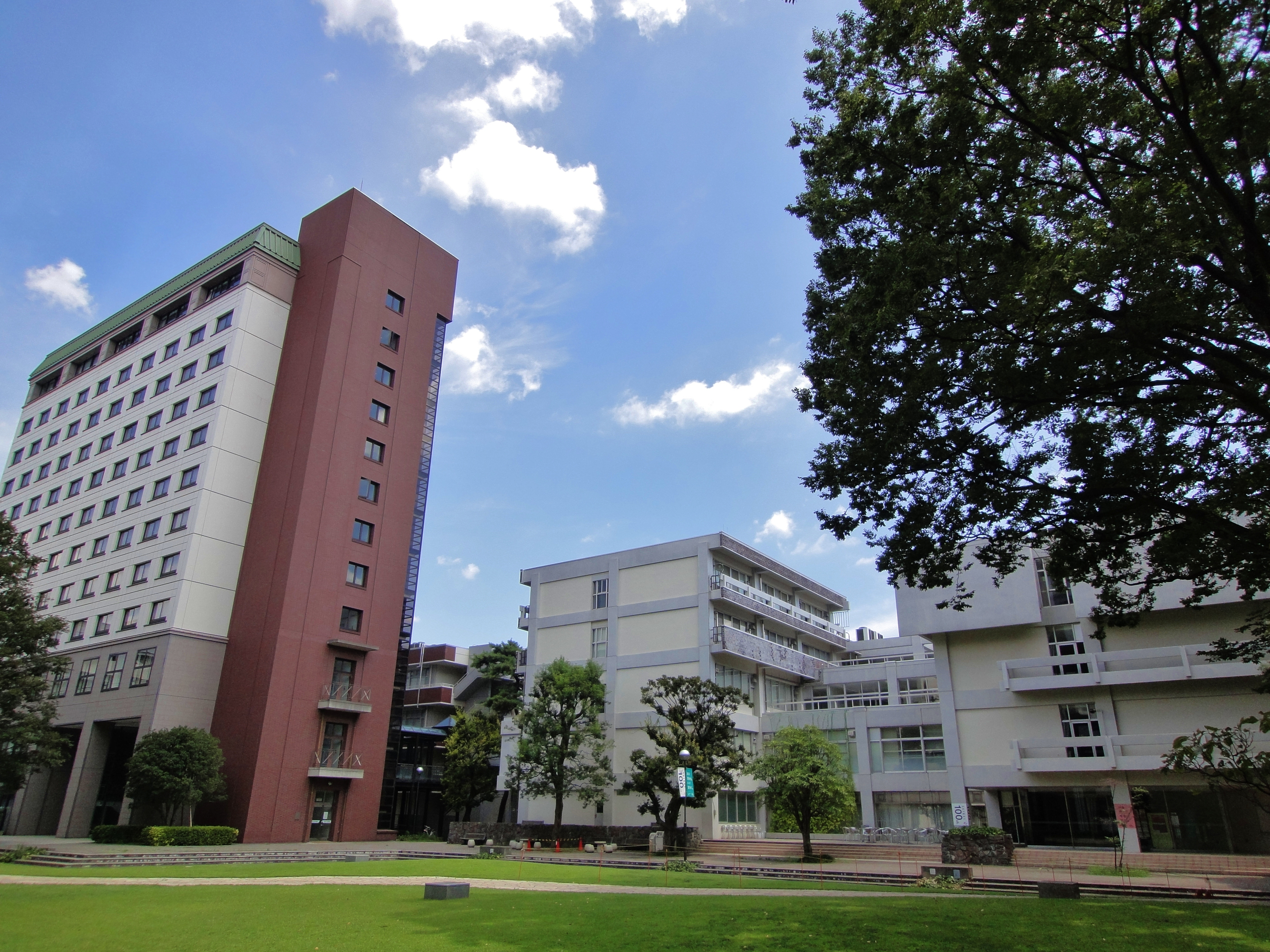 成蹊大学1号館・2号館・10号館 ※右側の灰色の建物は成蹊大学1号館・2号館で、左側の高い建物は成蹊大学10号館。